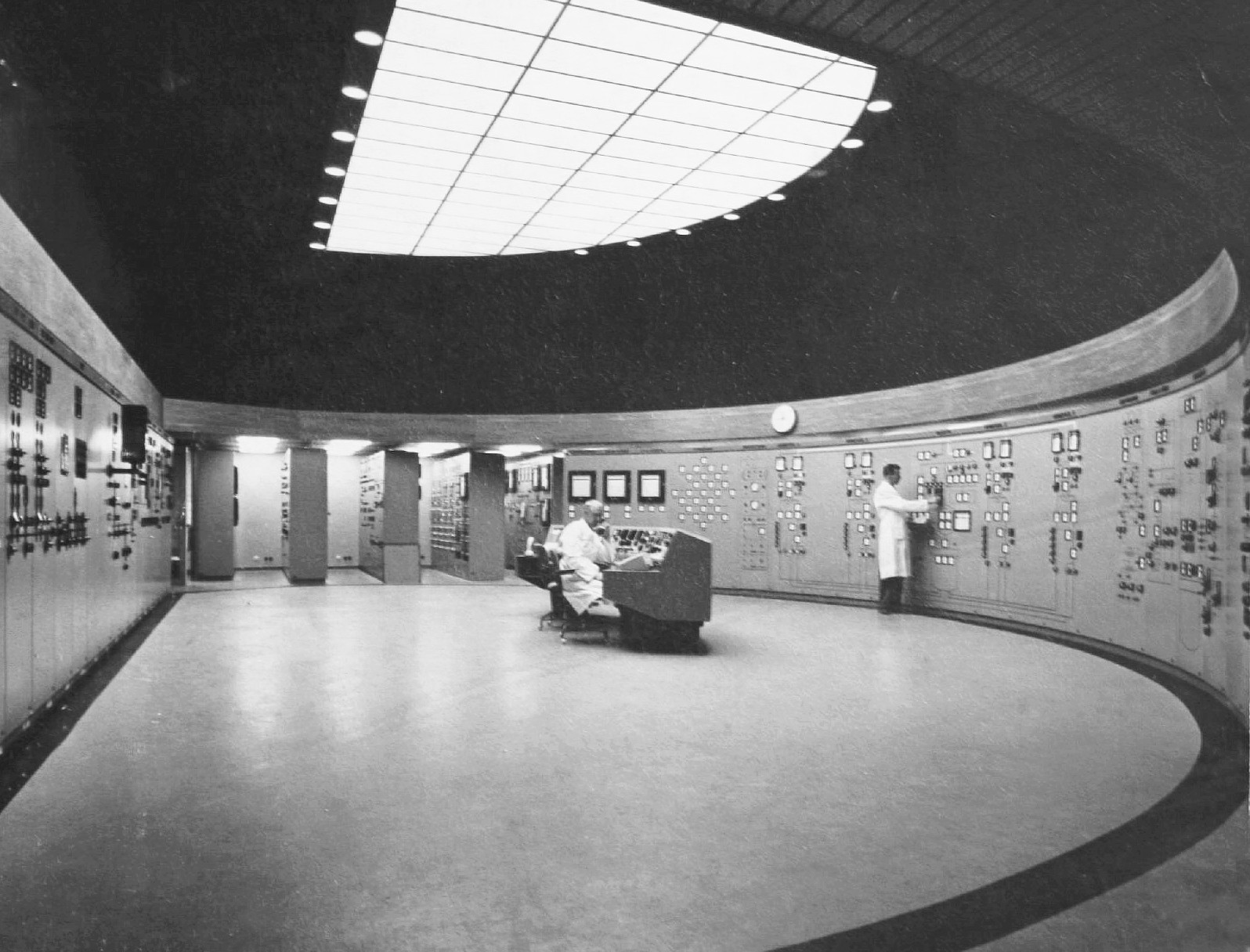 Kontrollrummet i Ågesta kärnkraftverk, Huddinge